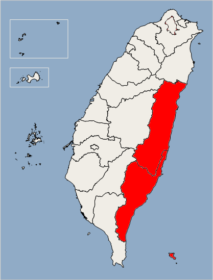 行政院東部聯合服務中心管轄範圍